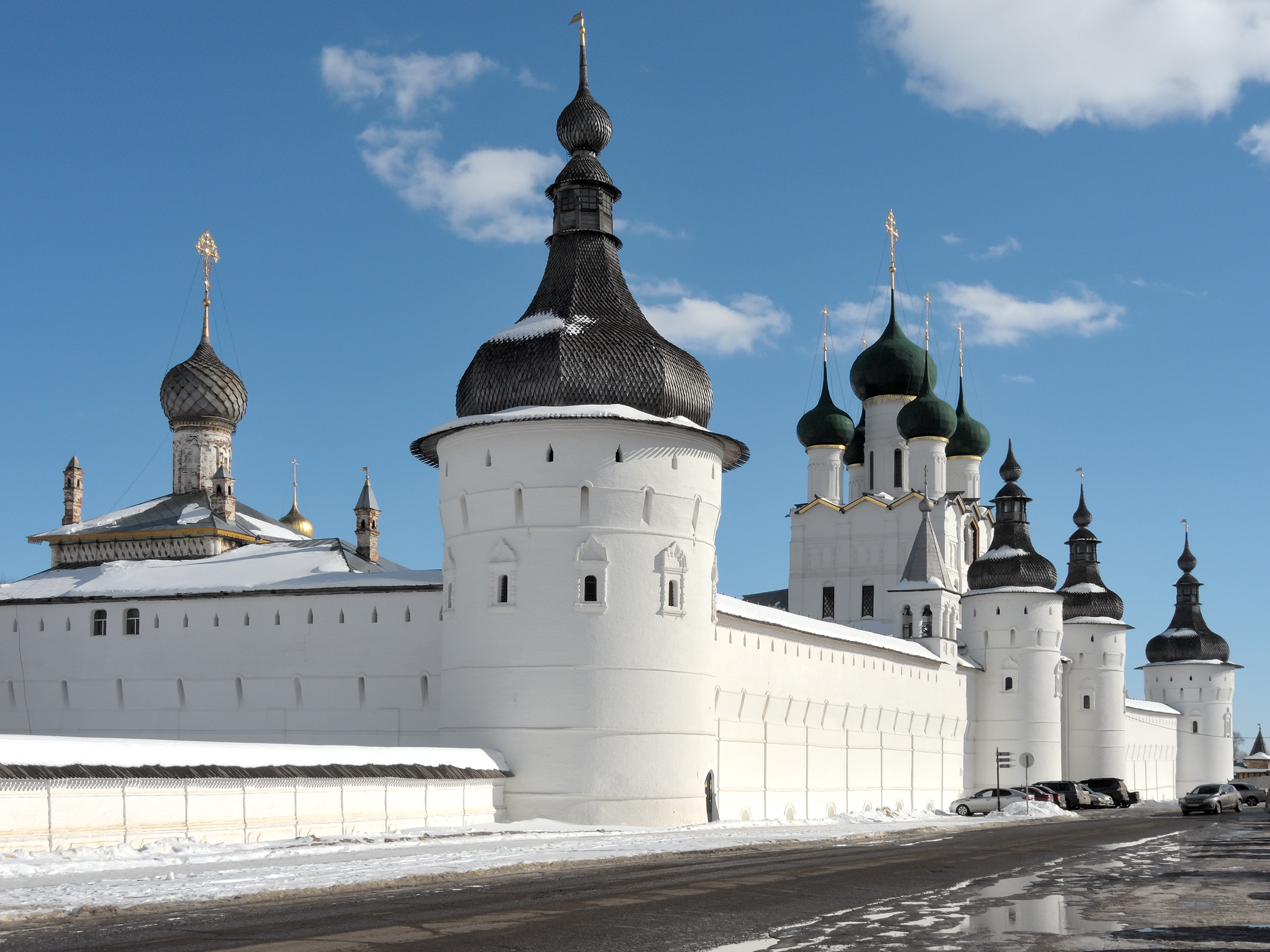 Ансамбль Ростовского Кремля: центр города, Ростов, Ярославская область